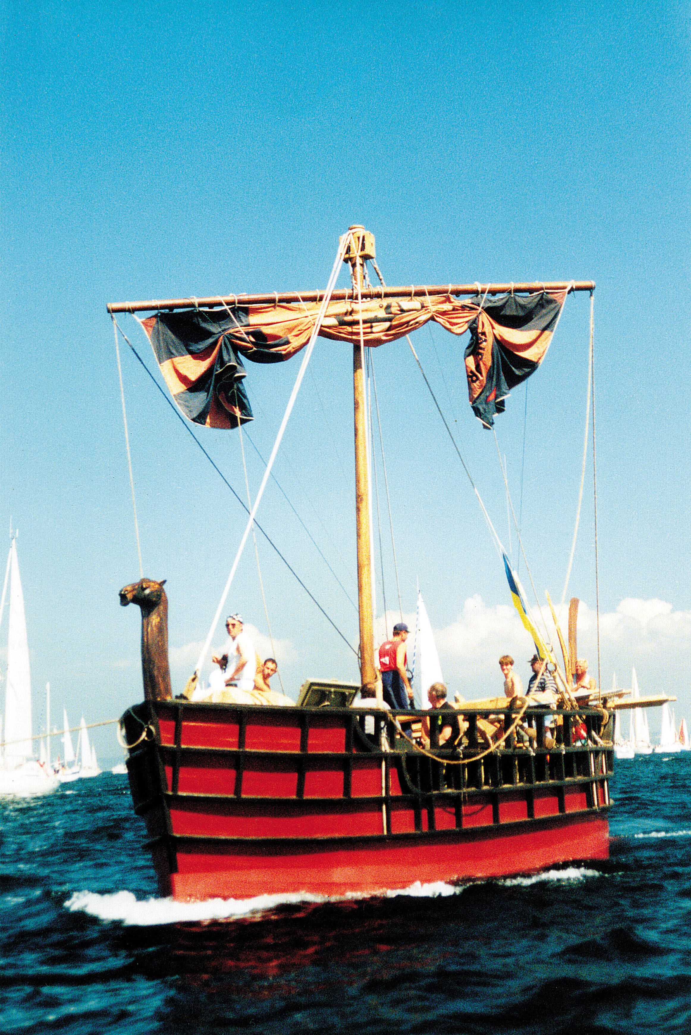 Копия финикийского торгового корабля. Построена в Одессе в 1999 году